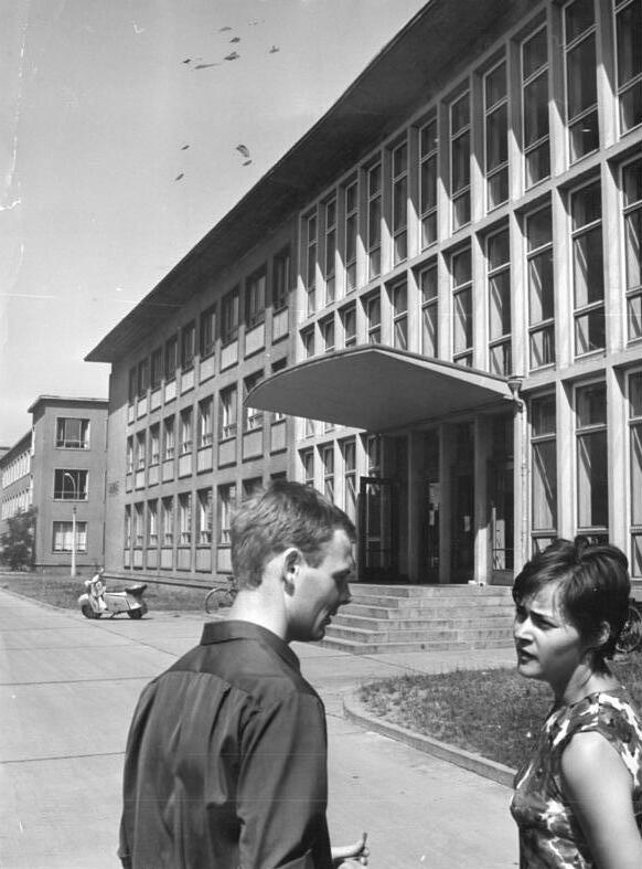 Magdeburg,Technischen Hochschule, Chemisches Institut Zentralbild Ritter fri-st. 22.6.1966 Magdeburg: Neues Chemisches Institut an der Technischen Hochschule Magdeburg: Sabine Wilke und Volker Kühne (beide im 8. Semester) gehören zu den 85 Direktstudenten, die sich z.Zt. in dem neuen Chemischen Institut der Technischen Hochschule "Otto von Guericke" Magdeburg auf ihre künftige Arbeit als Diplom-Chemiker vorbereiten. Darüber hinaus werden hier 400 Studenten anderer Fachrichtungen von vier Professoren betreut. Um den Bedürfnissen der chemischen Industrie entgegenzukommen, wird im Chemischen Institut der Magdeburger TH das Lehrgebiet der organischen Chemie eng mit der technischen Chemie, der Verfahrenstechnik und dem Apparatebau verflochten.